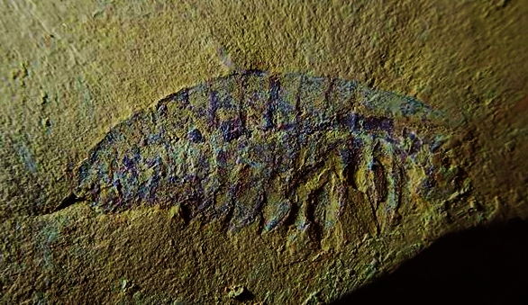 Fossil of Leanchoilia, an extinct arthropod- Picture at Bejing Museum of Natural History